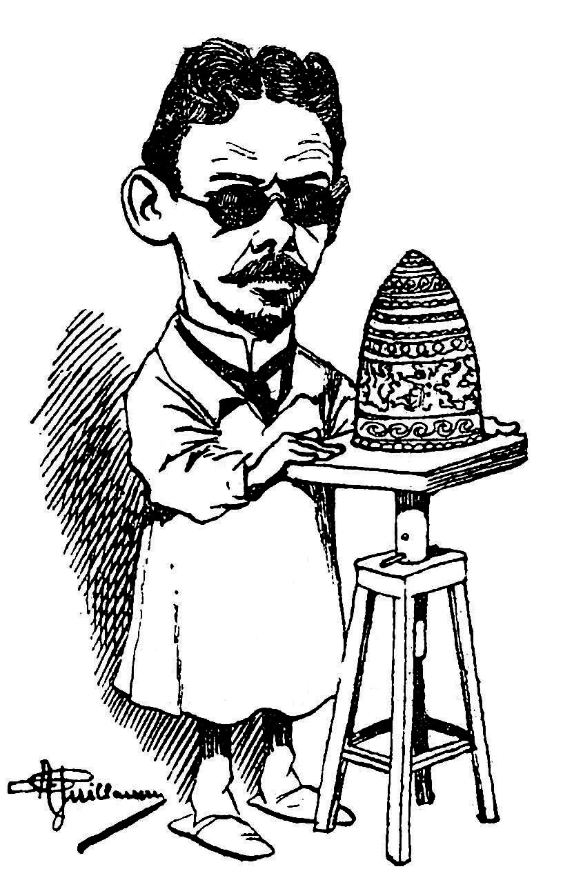 "Israël Rouchomovski" [sic].